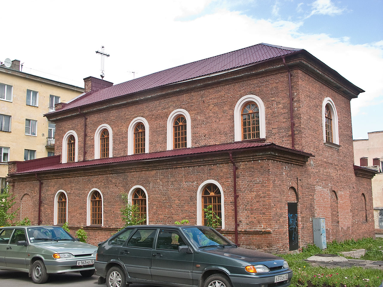 Россия: Карелия: Петрозаводск: Центр: пр.Ленина,11а: Римско-католическая церковь Божией матери; 13:49 13.06.2008